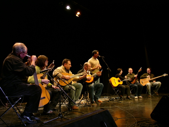 valencian folk ensemble La Rondalla de la Costera performing live in Dénia